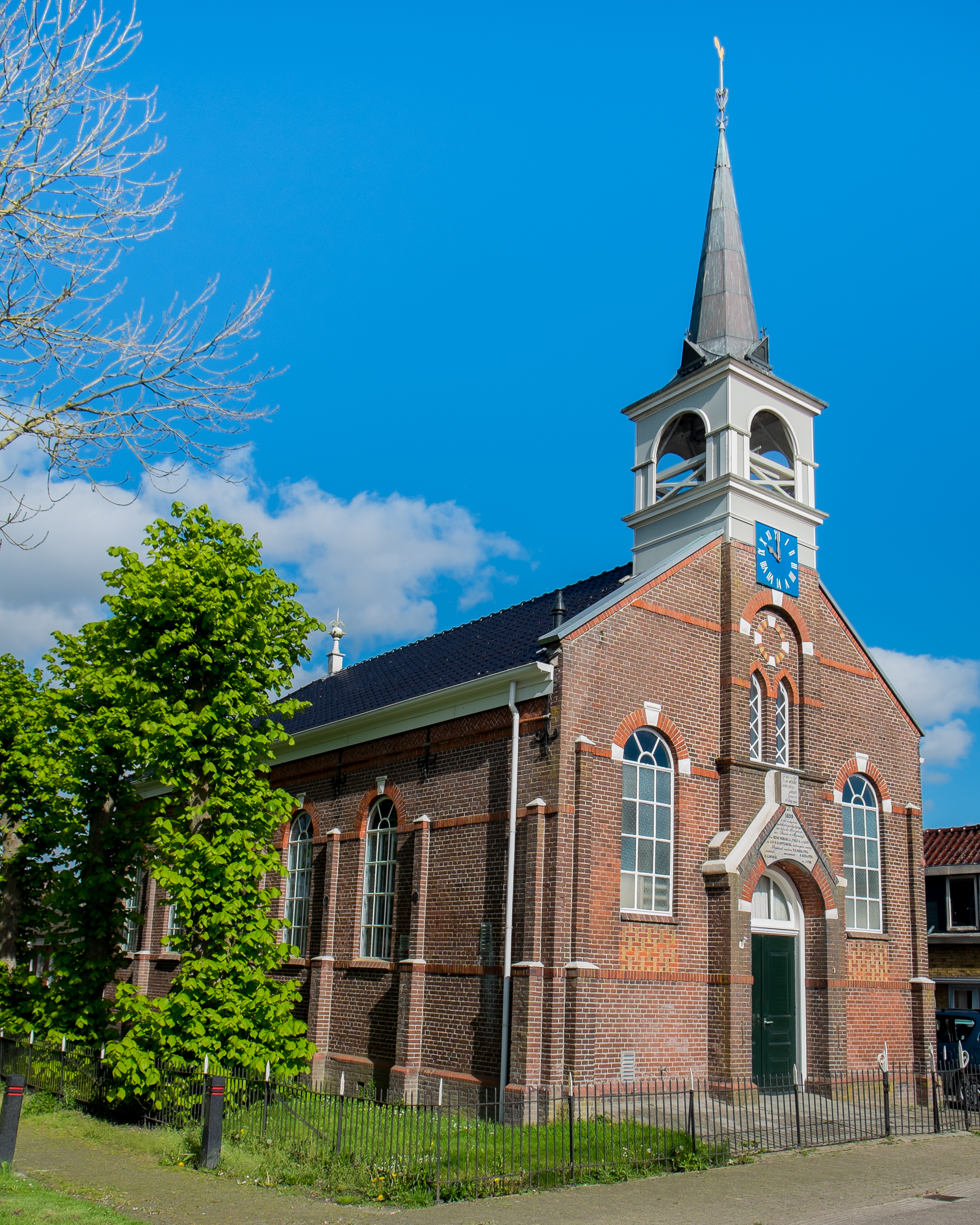 Hervormde kerk van Munnekezijl uit 1899. Ontwerp van architect Henderikus Albertus Zondag. Verving kerk uit 1665.